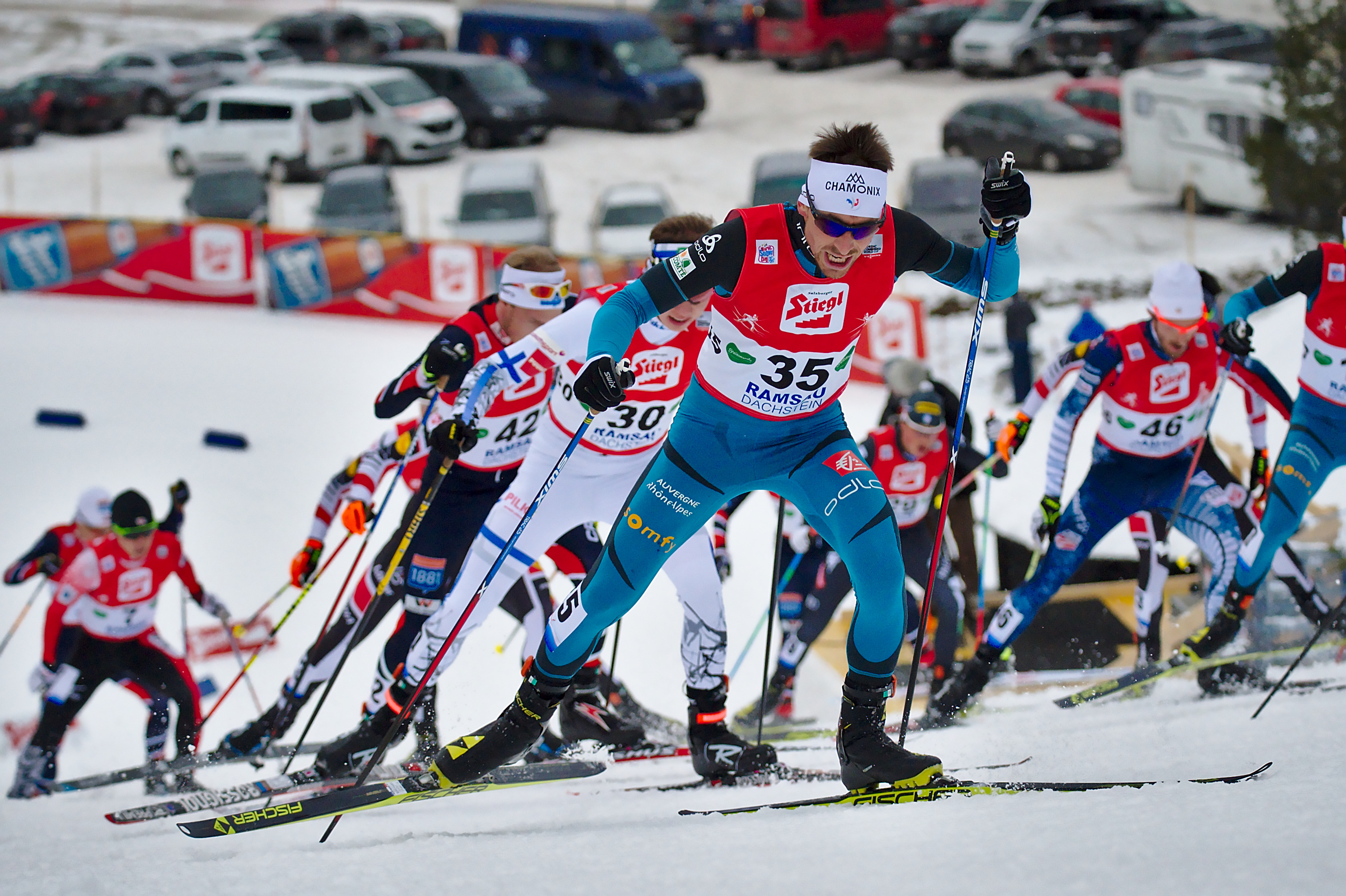 FIS Worldcup Nordic Combined Ramsau 2016. Bild zeigt Francois Braud (FRA)